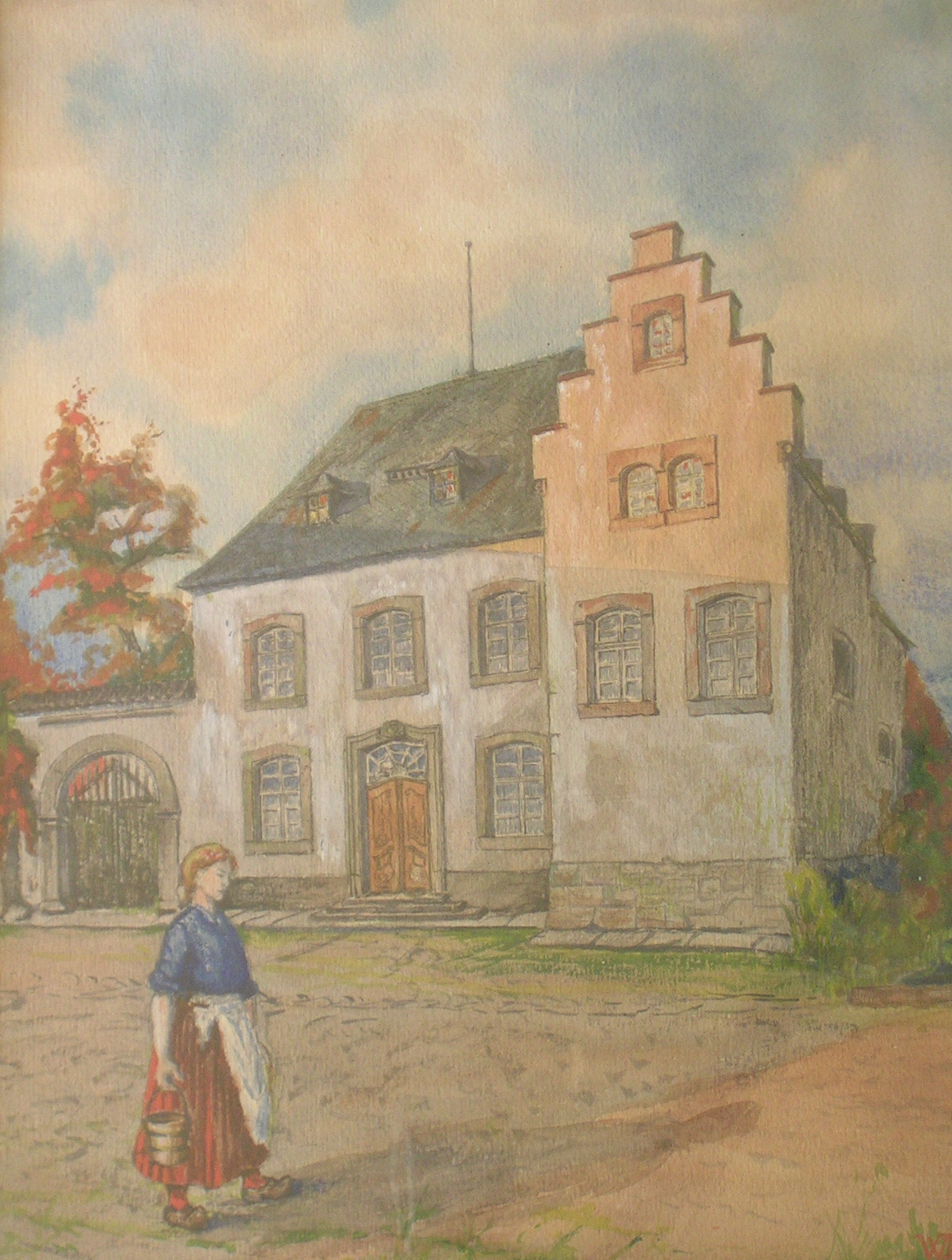 historische Ansicht der Wildenburg (Mitte 19. Jhd.)